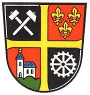 Wappen von St. Ingbert-Mitte